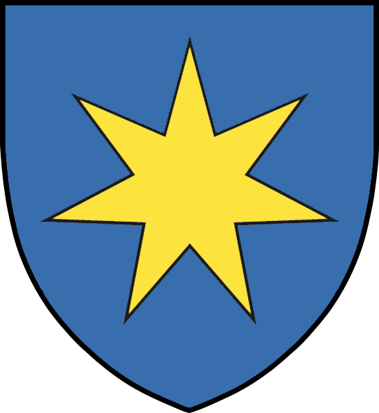 Stamvapen för ätten Gyllemstierna i Danmark och Sverige